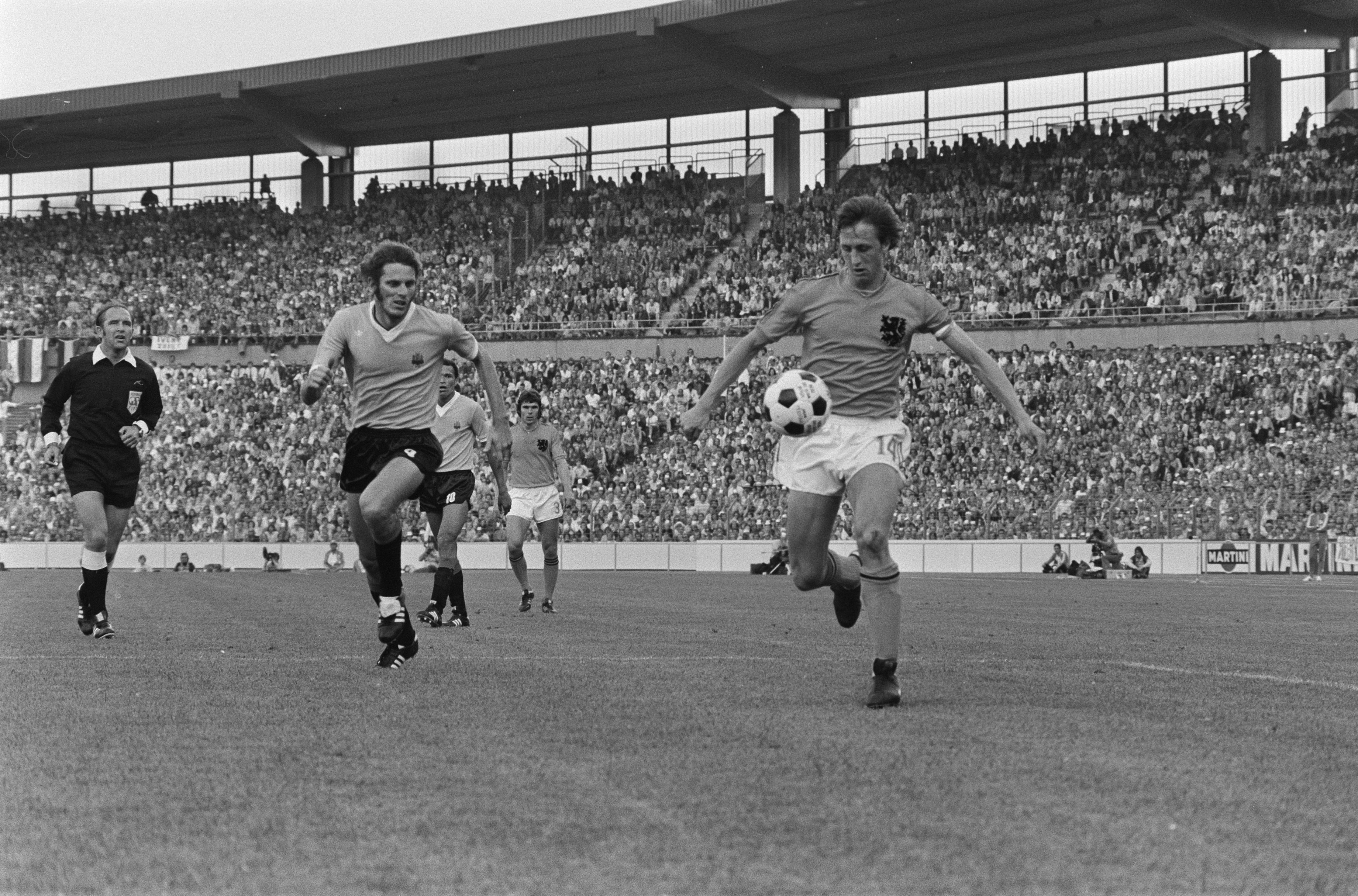 Collectie / Archief : Fotocollectie Anefo Reportage / Serie : [ onbekend ] Beschrijving : Wereldkampioenschap voetbal 1974; Nederland tegen Uruguay 2-0; spelmomenten Datum : 15 juni 1974 Trefwoorden : sport, voetbal, wereldkampioenschappen Fotograaf : Verhoeff, Bert / Anefo Auteursrechthebbende : Nationaal Archief Materiaalsoort : Negatief (zwart/wit) Nummer archiefinventaris : bekijk toegang 2.24.01.05 Bestanddeelnummer : 927-2595